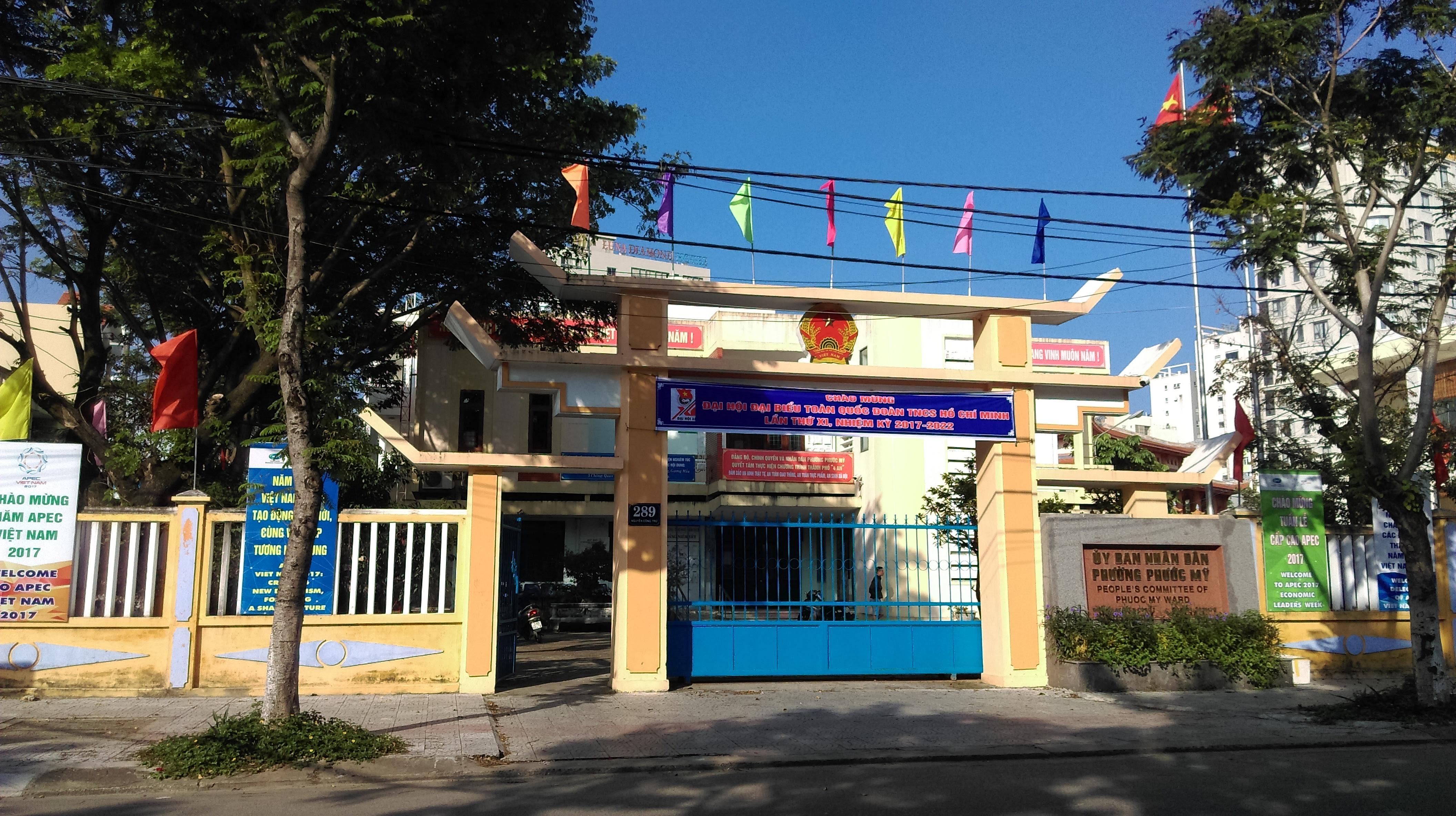 UBND phường Phước Mỹ, Sơn Trà, Đà Nẵng